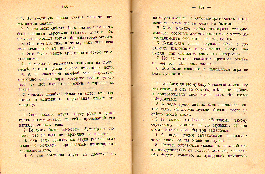 Андрей Белый, "Симфония вторая", драматическая, М., изд. В. В. Пашуканиса, стр. 166-167